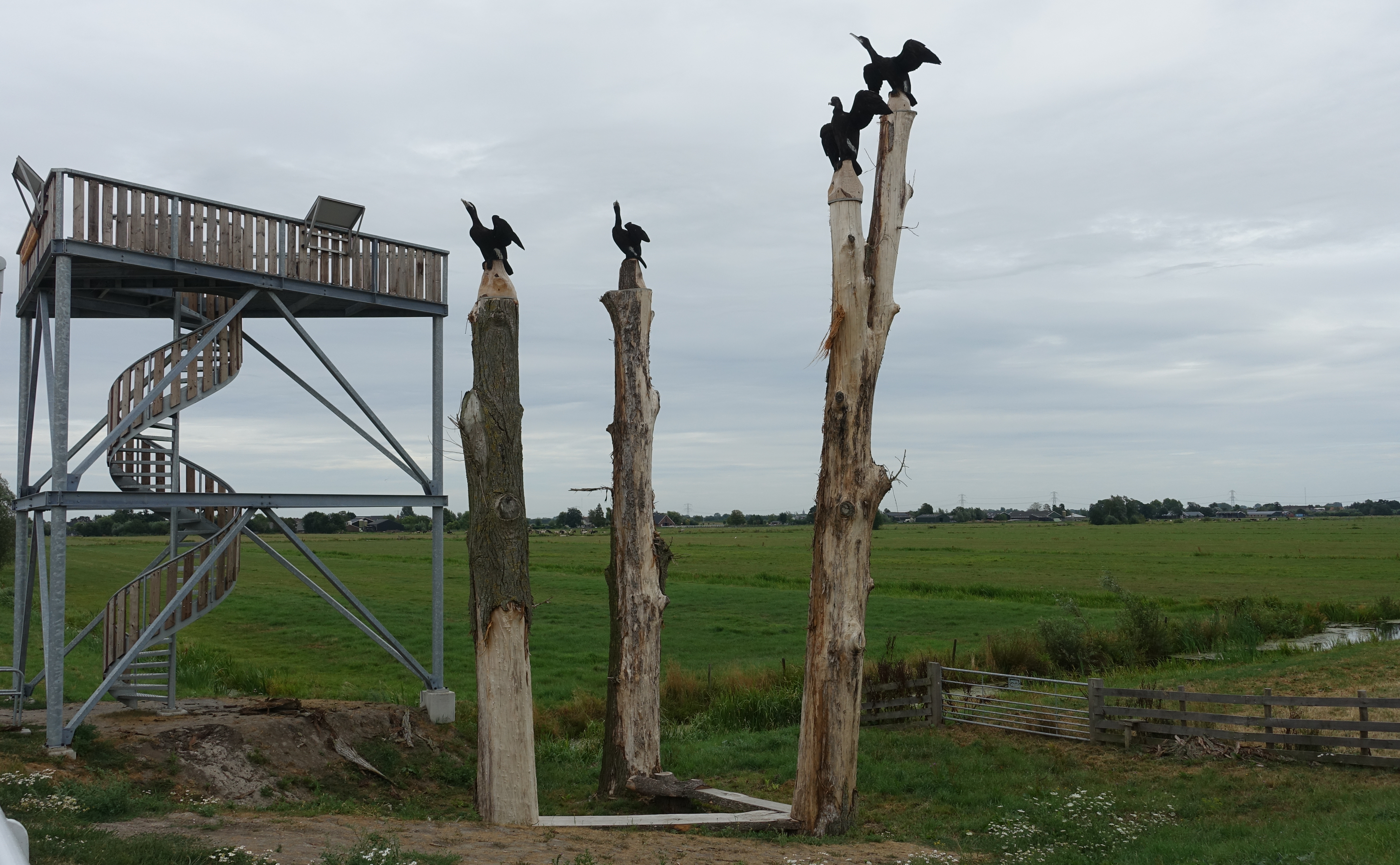 Uitzichttoren Wierickewachter met de resten van bomen en daarbovenop beelden van aalscholvers, gemaakt door houtsnijder Dave Hamsworth